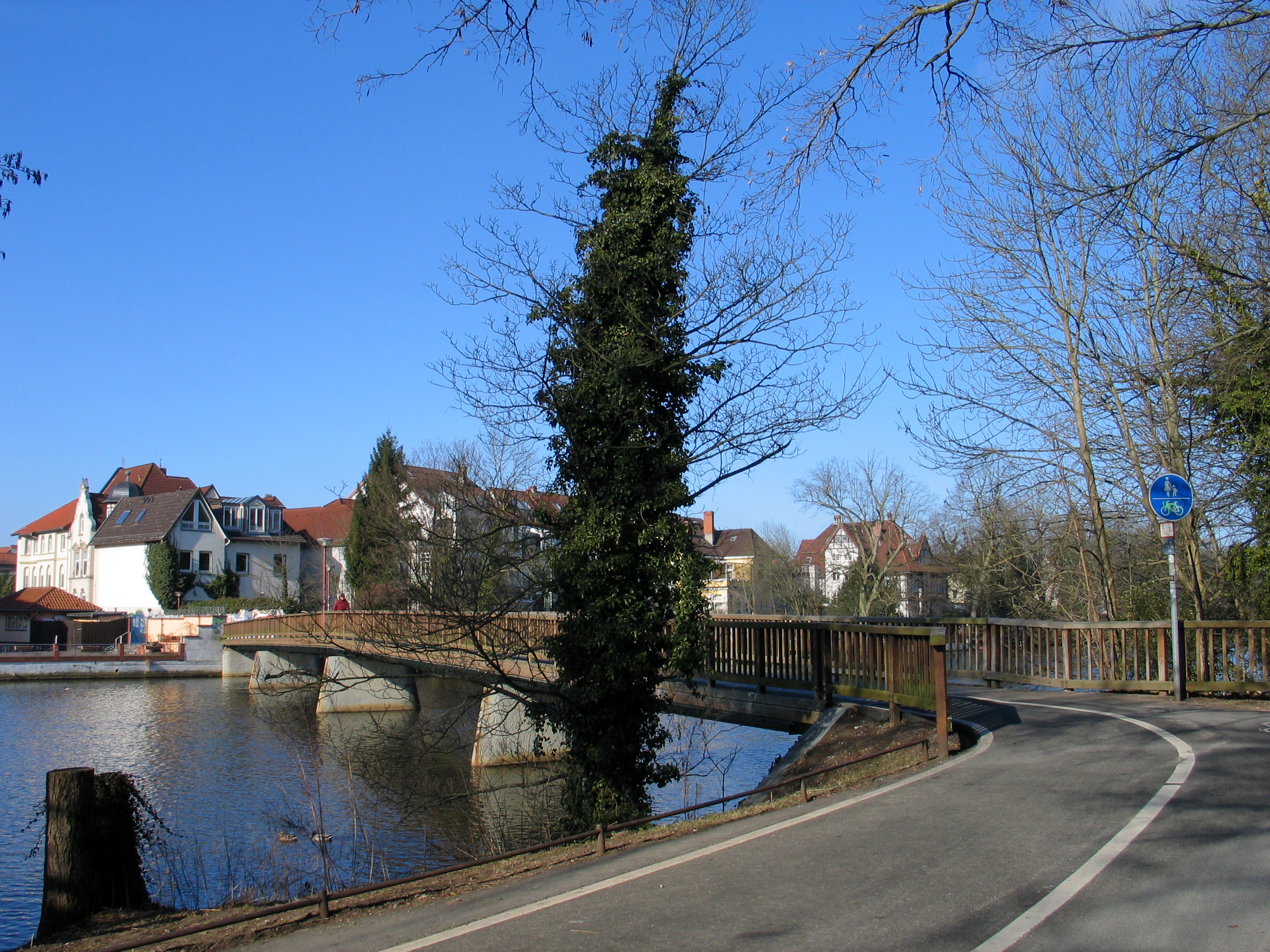 Noch zu beschreibendes und zu kategorisierendes Foto aus Celle ...